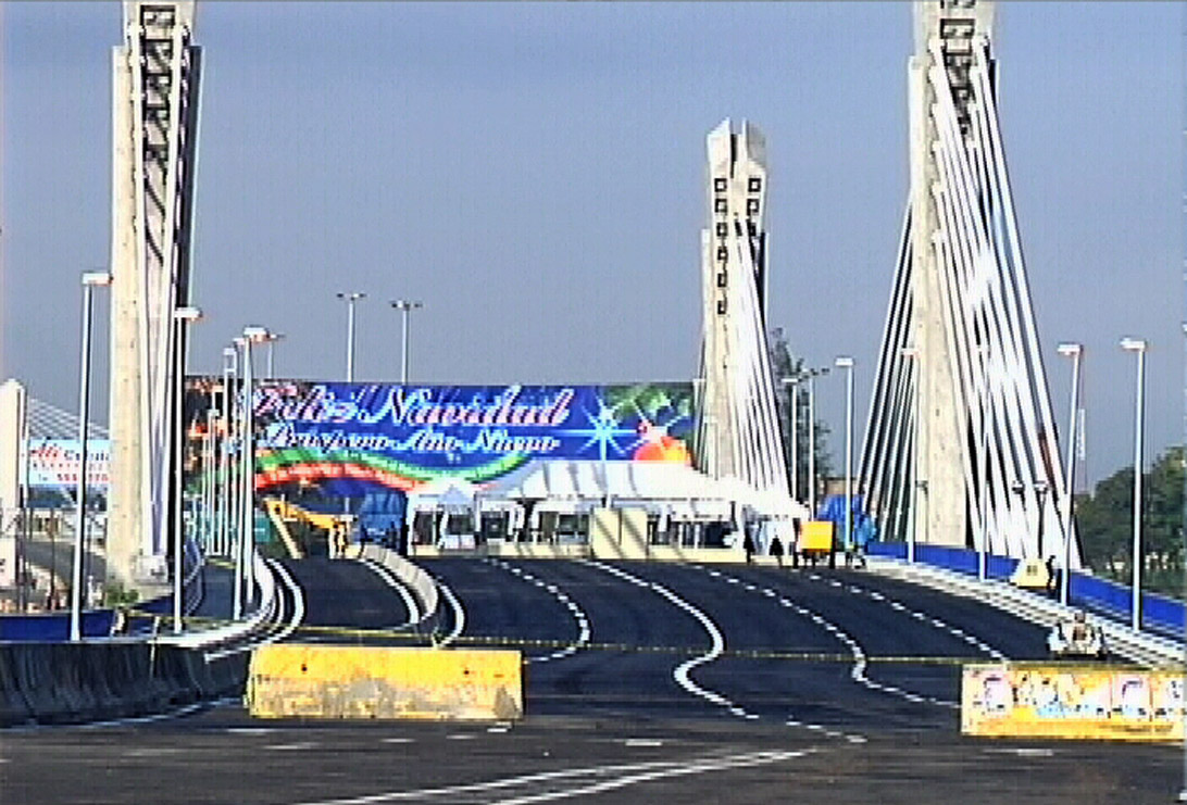 Captura de vídeo del puente Juan Bosch, en sentido este-oeste, poco antes de su inauguración en diciembre de 2001. Se aprecian a la derecha los cinco carriles que conectan la provincia Santo Domingo con el Distrito Nacional y a la izquierda el carril de entrada a la provincia Santo Domingo desde el Distrito Nacional.